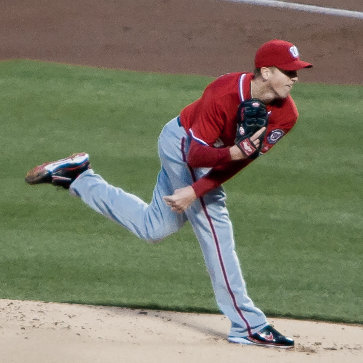 Tom Gorzelanny